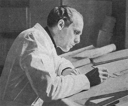 Formgivaren Sigurd Persson